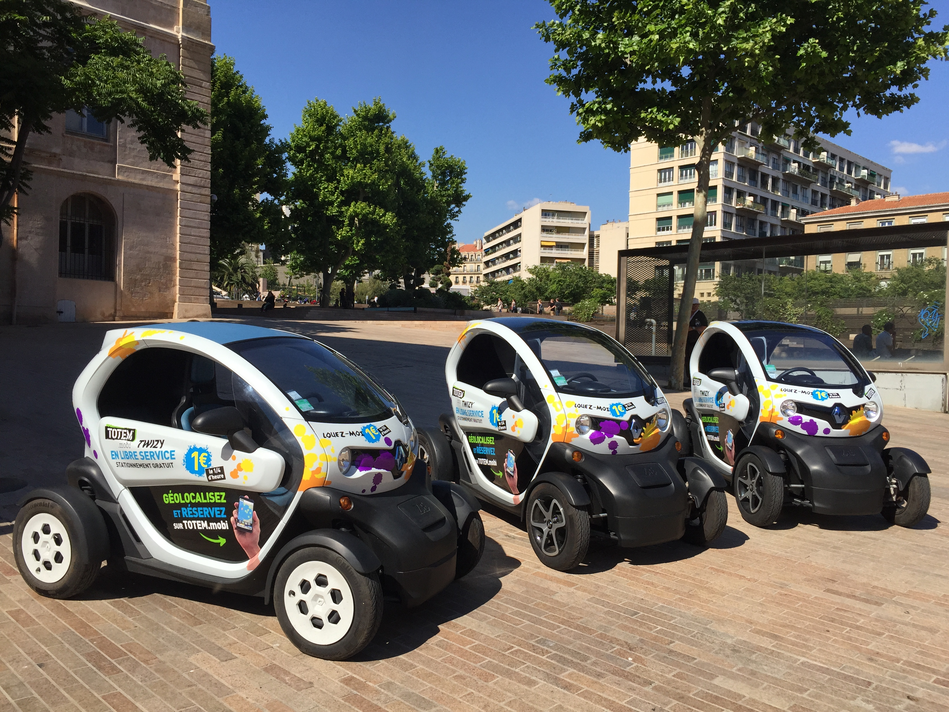 TOTEM mobi: service d'autopartage en free-floating avec stationnement libre